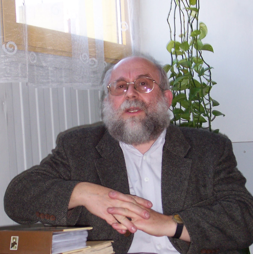 Krzysztof Kmieć rozmawia z Mirosławem Zbigniewem Wojalskim organizatorem wystawy jego ekslibrisów w 2006 r. w Widzewskiej Galerii Ekslibrisu w Łodzi